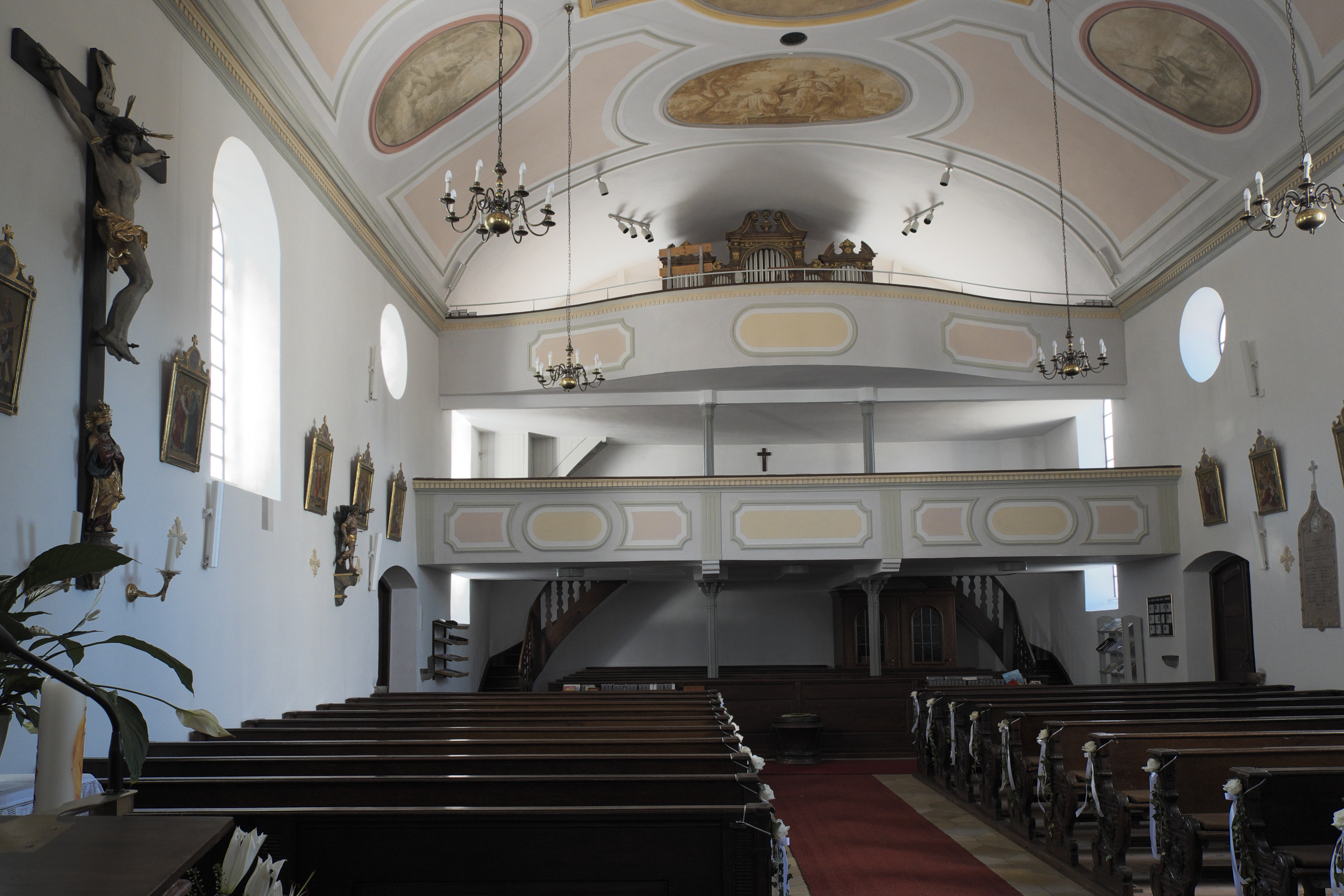 Katholische Pfarrkirche St. Michael in Jesenwang im Landkreis Fürstenfeldbruck (Bayern/Deutschland), Innenraum